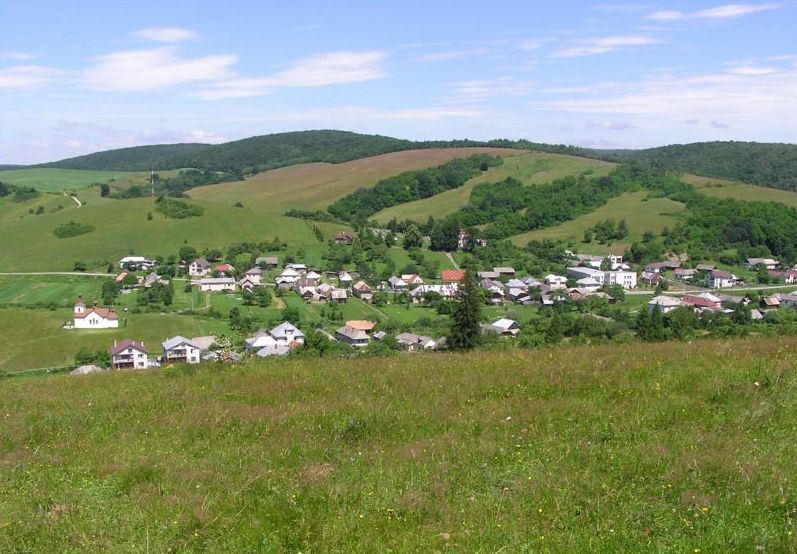 Celkový pohľad na Brusnicu